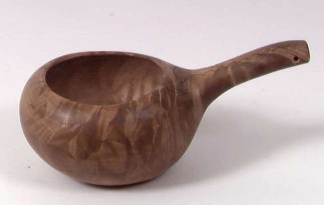 Nord-samisk nahppi skåret av Ole Triumf. Foto Norsk Folkemuseum, NFSA.4372.